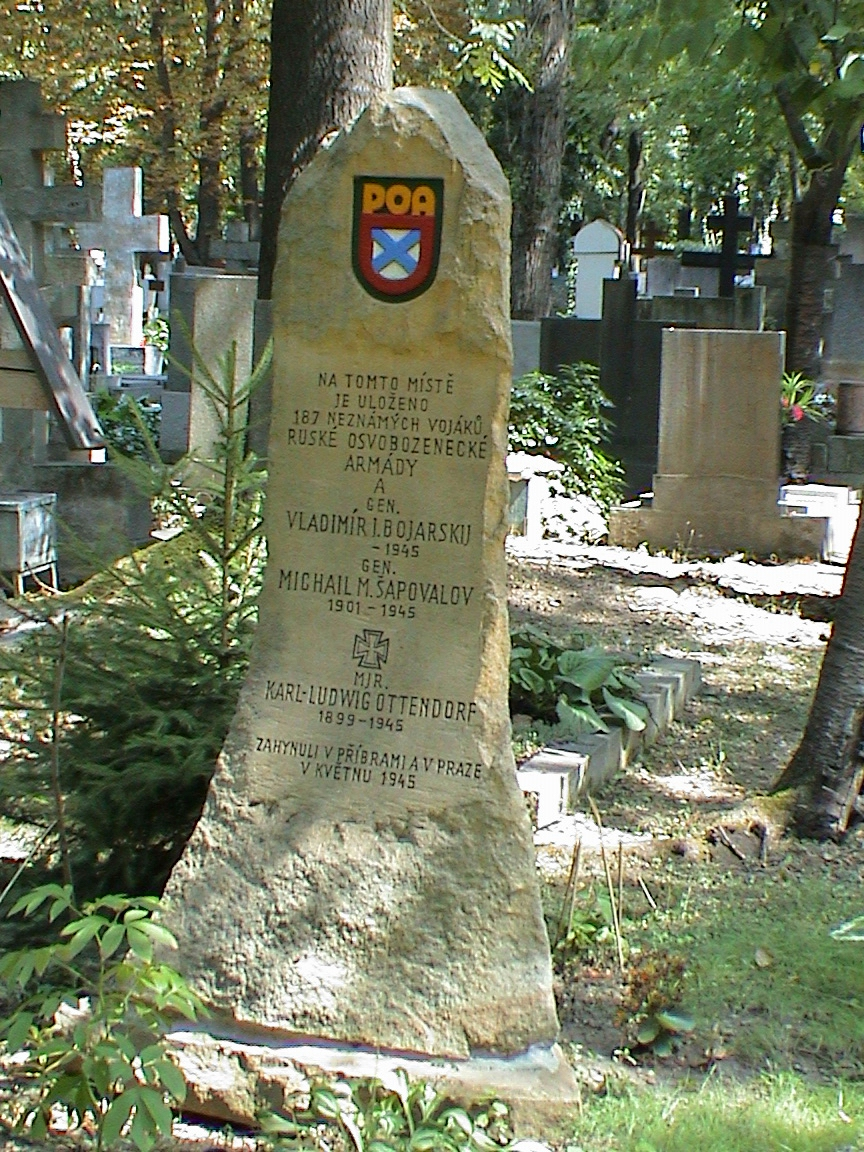 Olšanské hřbitovy, Ruská osvobozenecká armáda